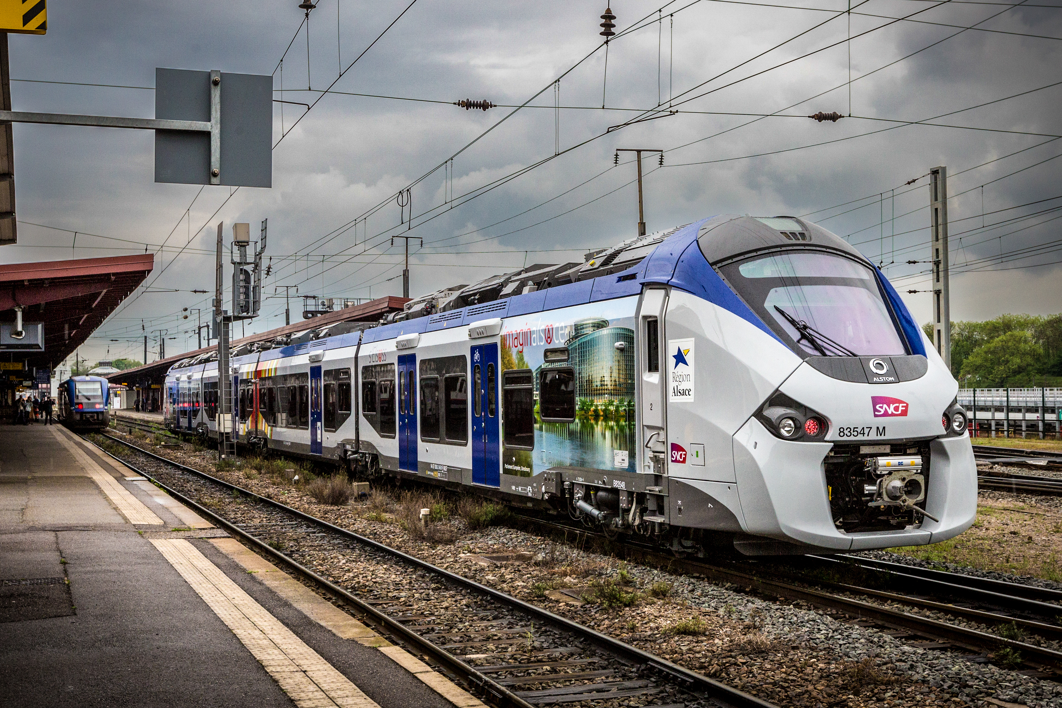 Le premier train Régiolis SNCF Région Alsace B83547M en service commercial dans la région Alsace, TER 830910 Strasbourg-Sarreguemines 28 avril 2014.